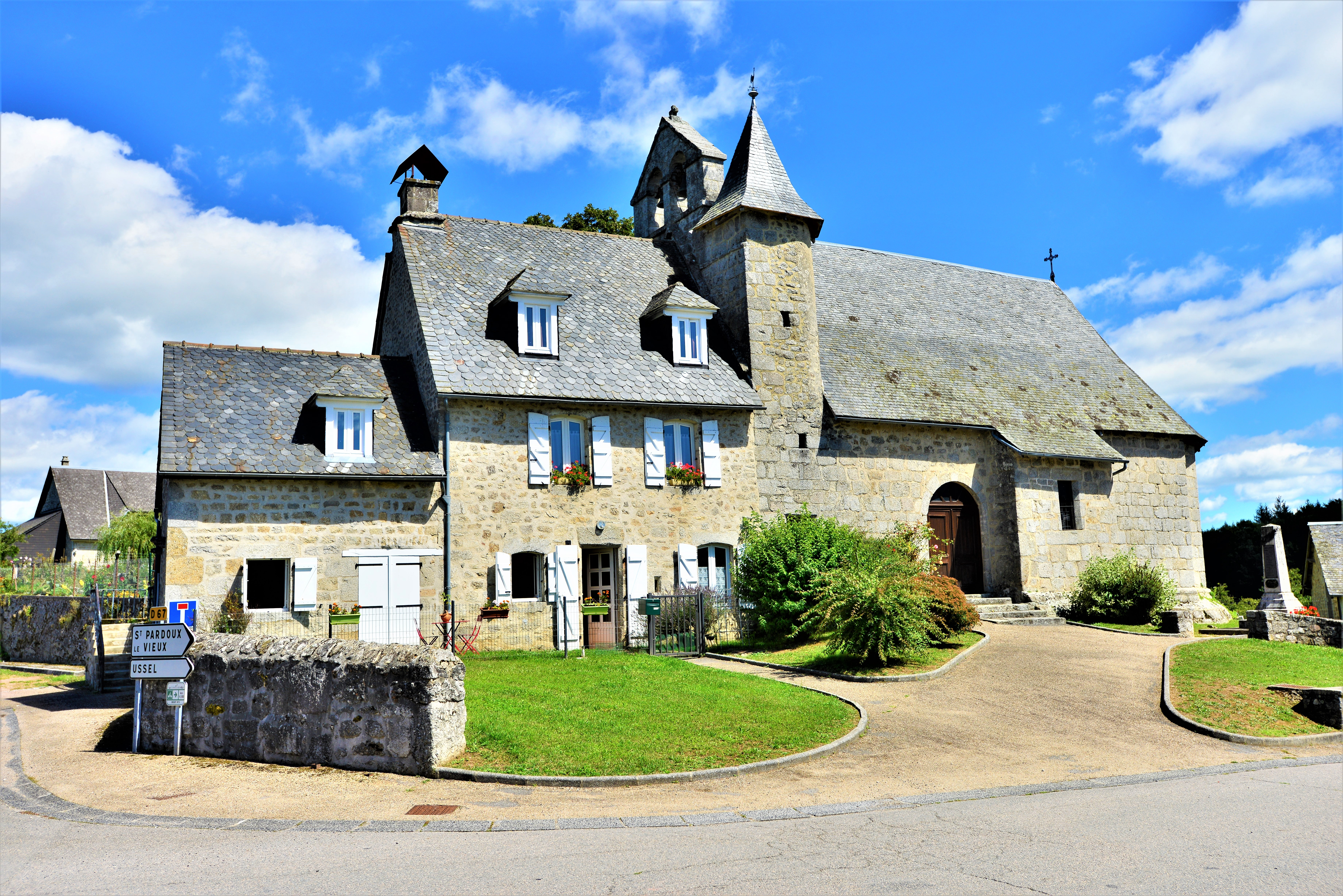 L'église Saint-Clair (et presbytère) de Chaveroche, antérieure au XIVème siècle et qui a été remaniée aux XVII (linteau gravé 1613) et XVIII siècles est une rareté en Corrèze, France.